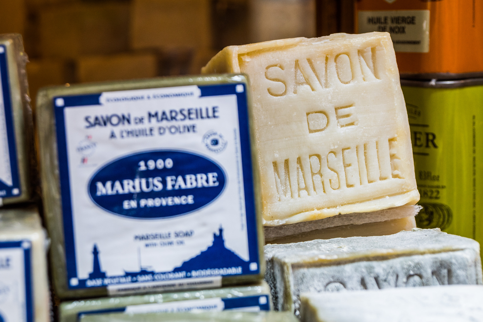 500px provided description: Savon de Marseille [#Marseille ,#France ,#Beauty ,#Provence ,#Soap]